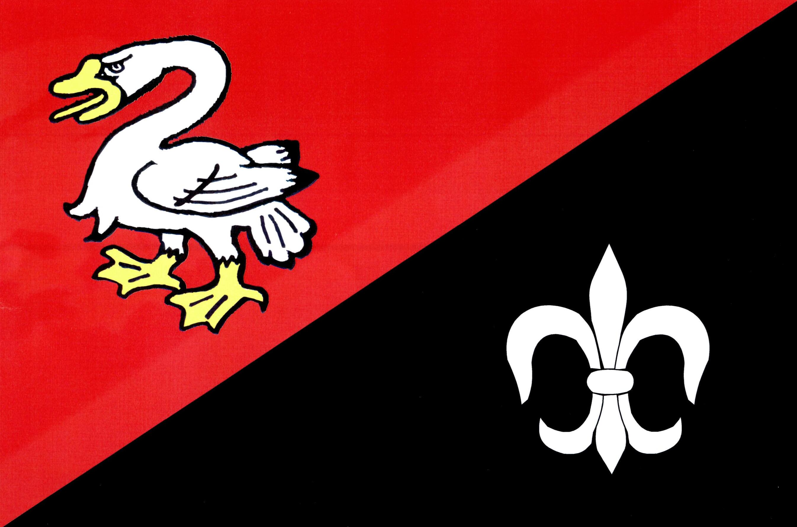 Vlajka obce Staré Sedlo (okres Tachov)